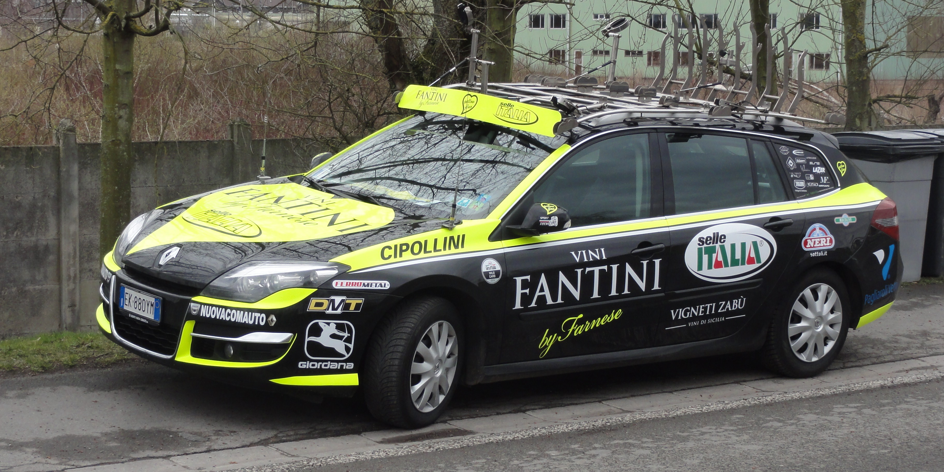 Reportage photographique réalisé le mardi 11 avril 2013 durant l'édition 2013 du Grand Prix de Denain à Denain, Nord, Nord-Pas-de-Calais, France. Véhicule de l'équipe Vini Fantini